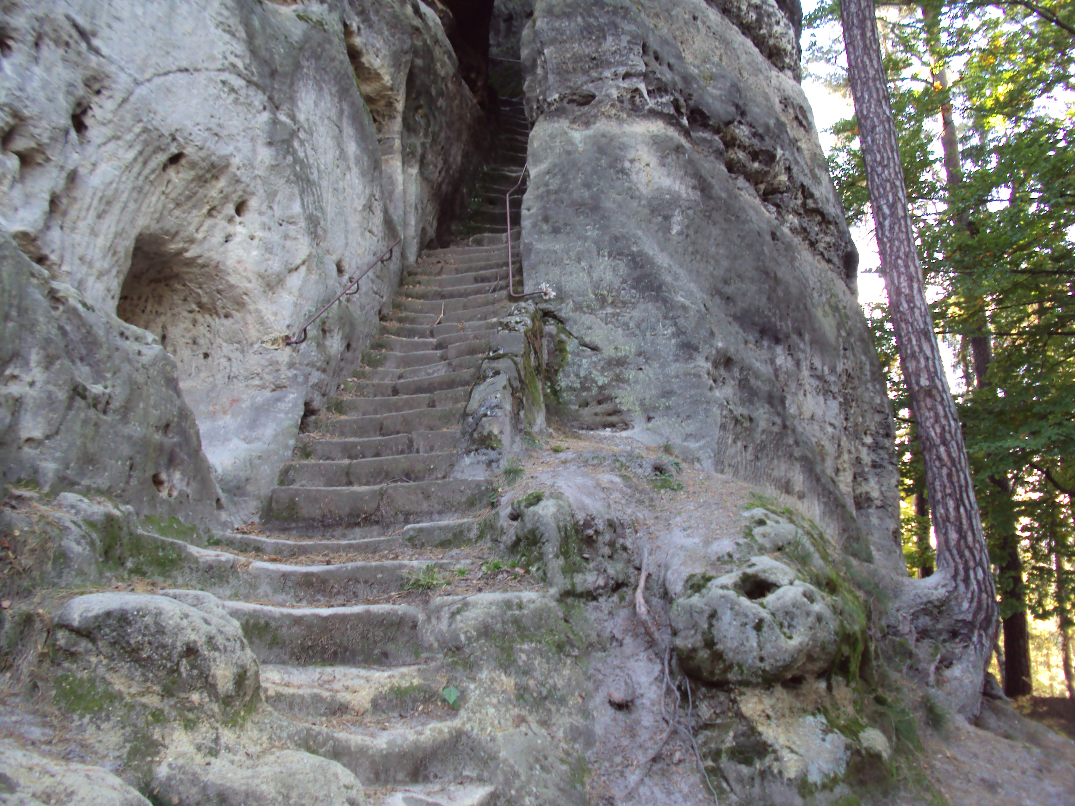 Přírodní památka Stohánek 4km jižně od Hamr na Jezeře